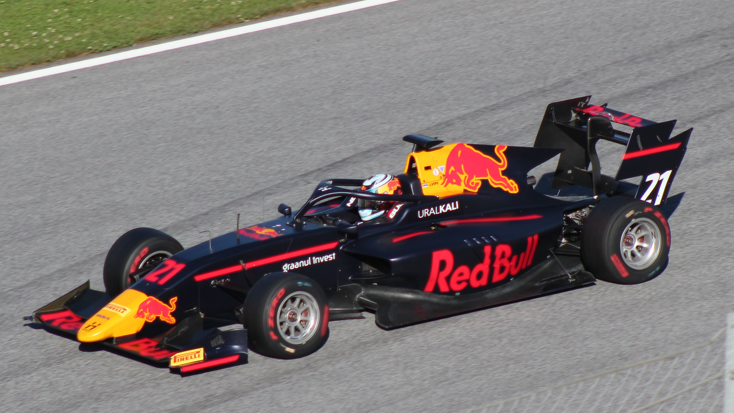 Vips beim Rennwochenende in Österreich 2019